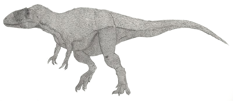 Reconstitution de Megaraptor